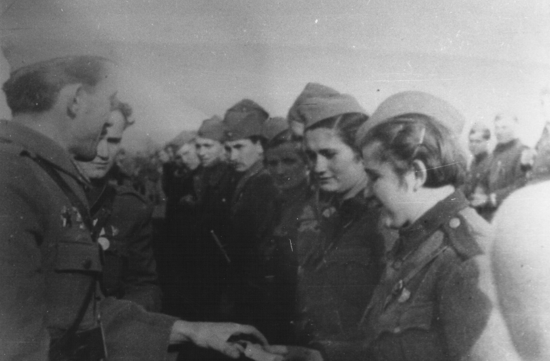 Alcune partigiane jugoslave del XII Korpus dell'Esercito popolare di liberazione